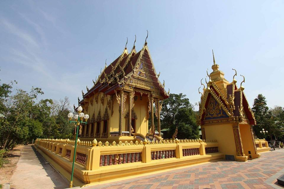 พระอุโบสถวัดป่าสุนทราราม บ้านกุดแห่ ตำบลกุดแห่ อำเภอเลิงนกทา จังหวัดยโสธร